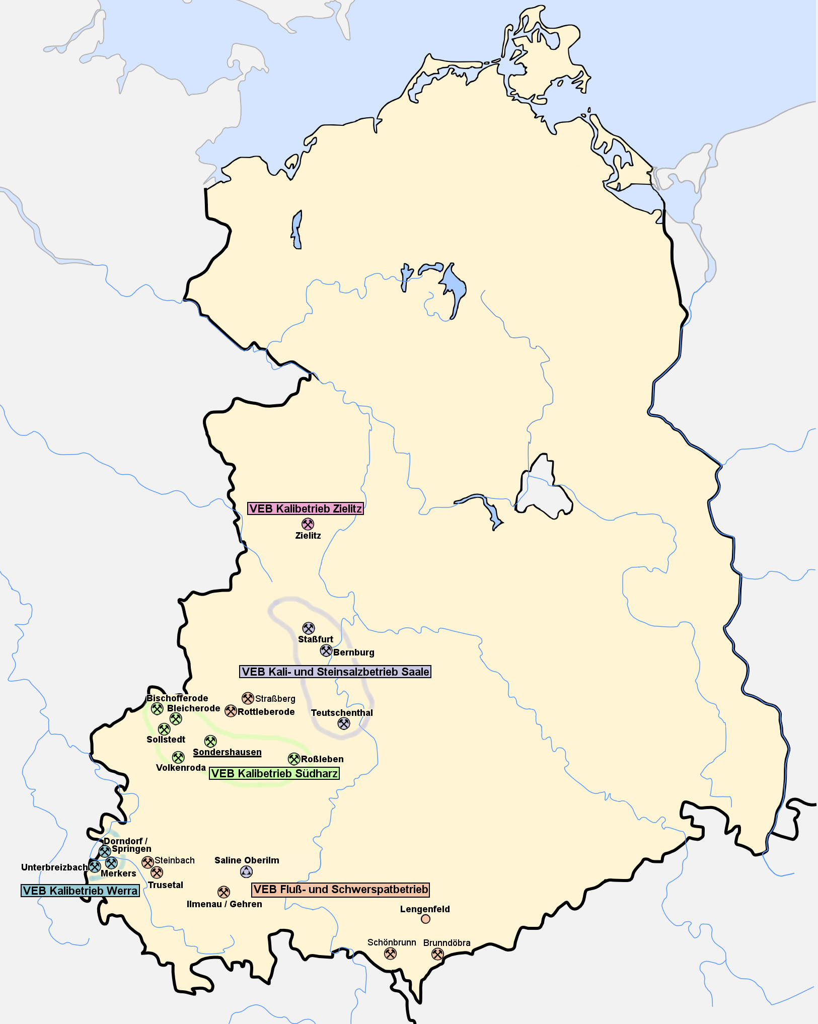 Standorte Kalikombinat in der DDR